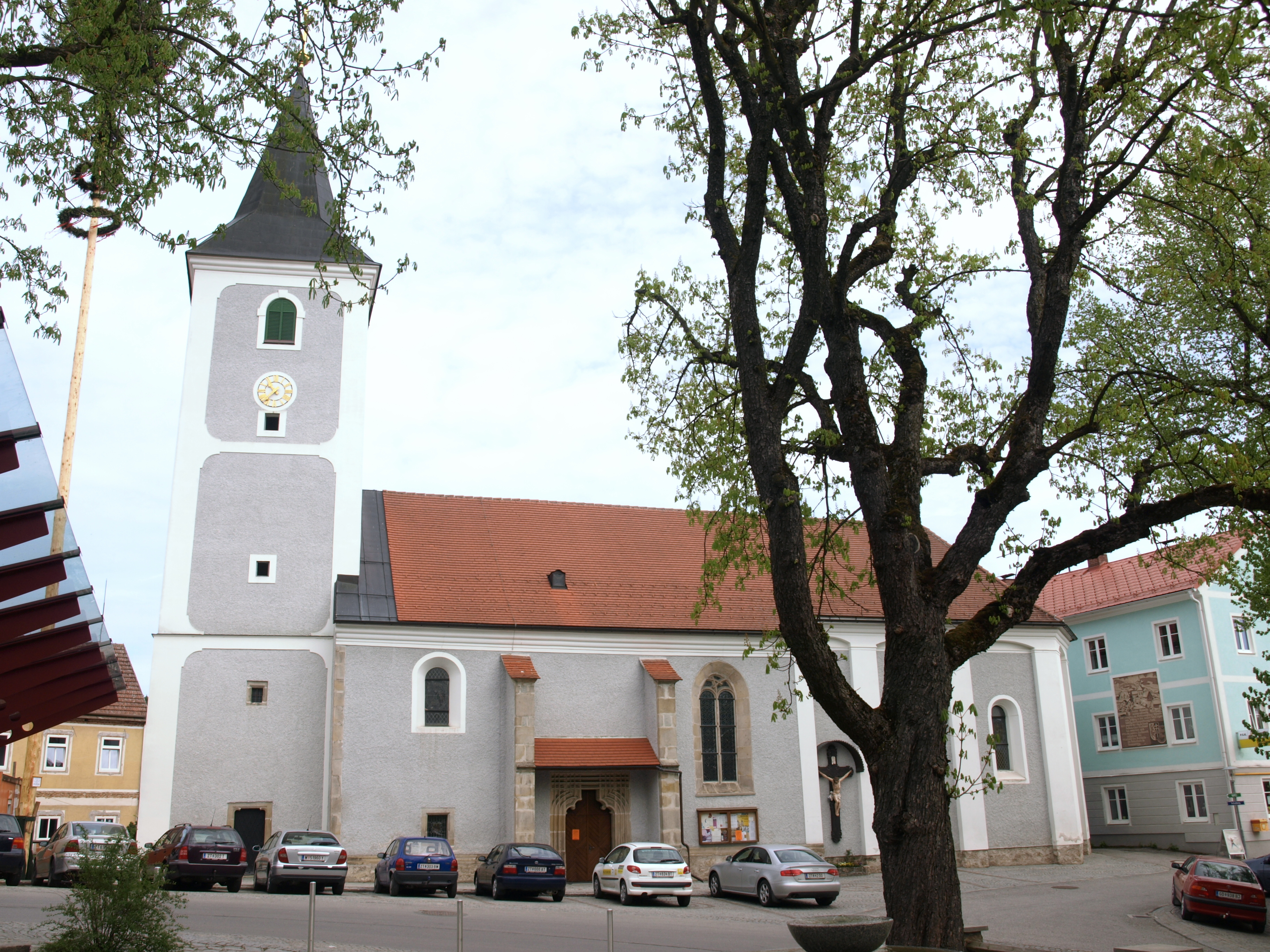 Kath. Pfarrkirche hl. Stephan